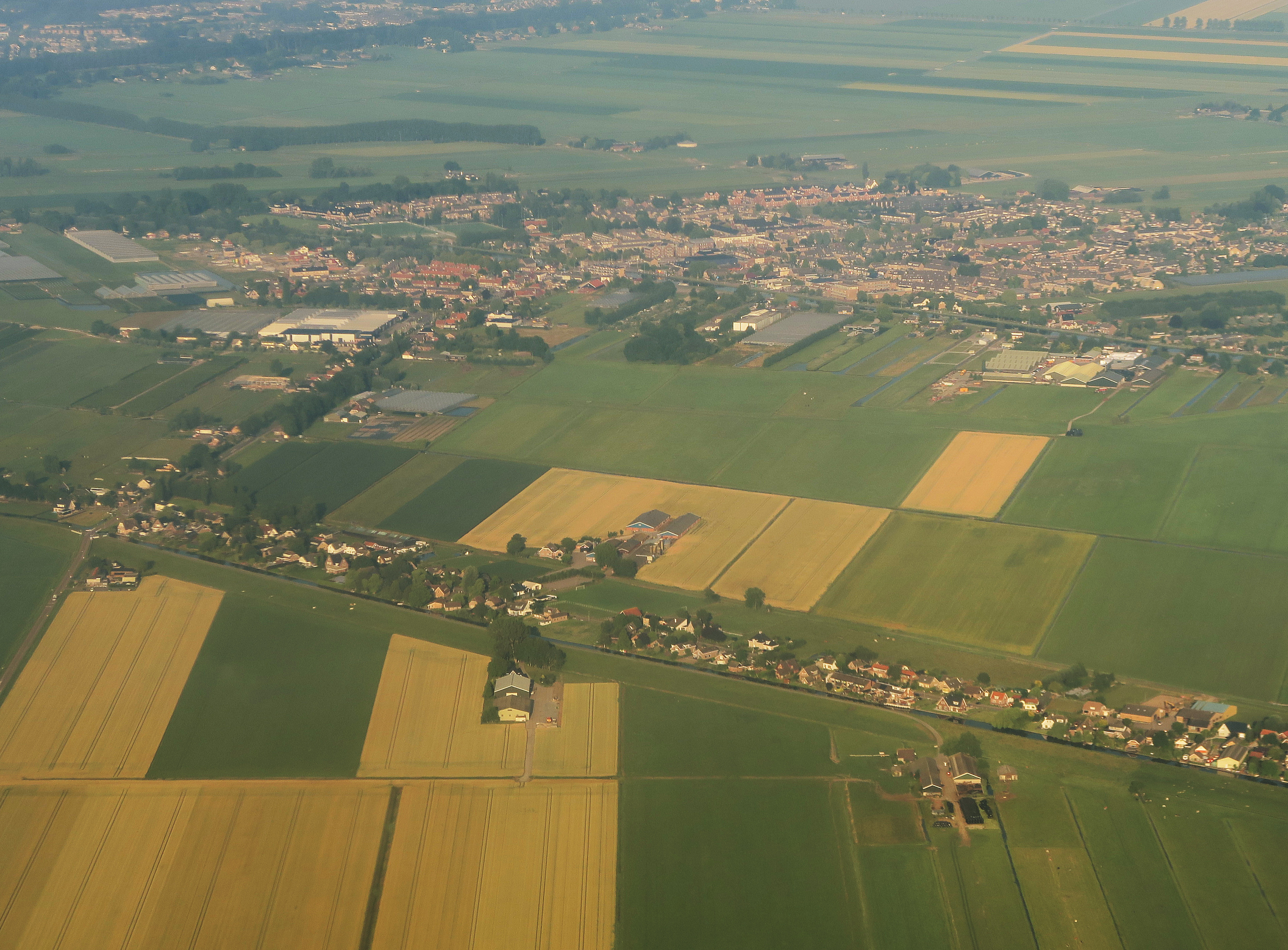 Korteraar, met daarachter Ter Aar, gezien naar het westen